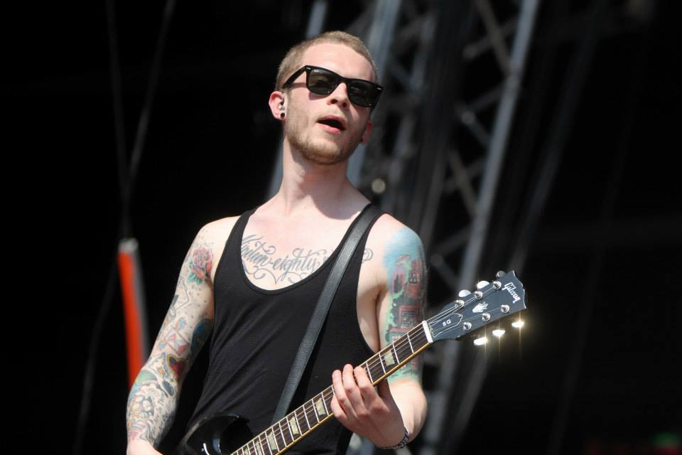 Guitarist Danny Jungslund fra Dúné. Her under Wild Hearts Tour koncert på Nibe Festival 2013.